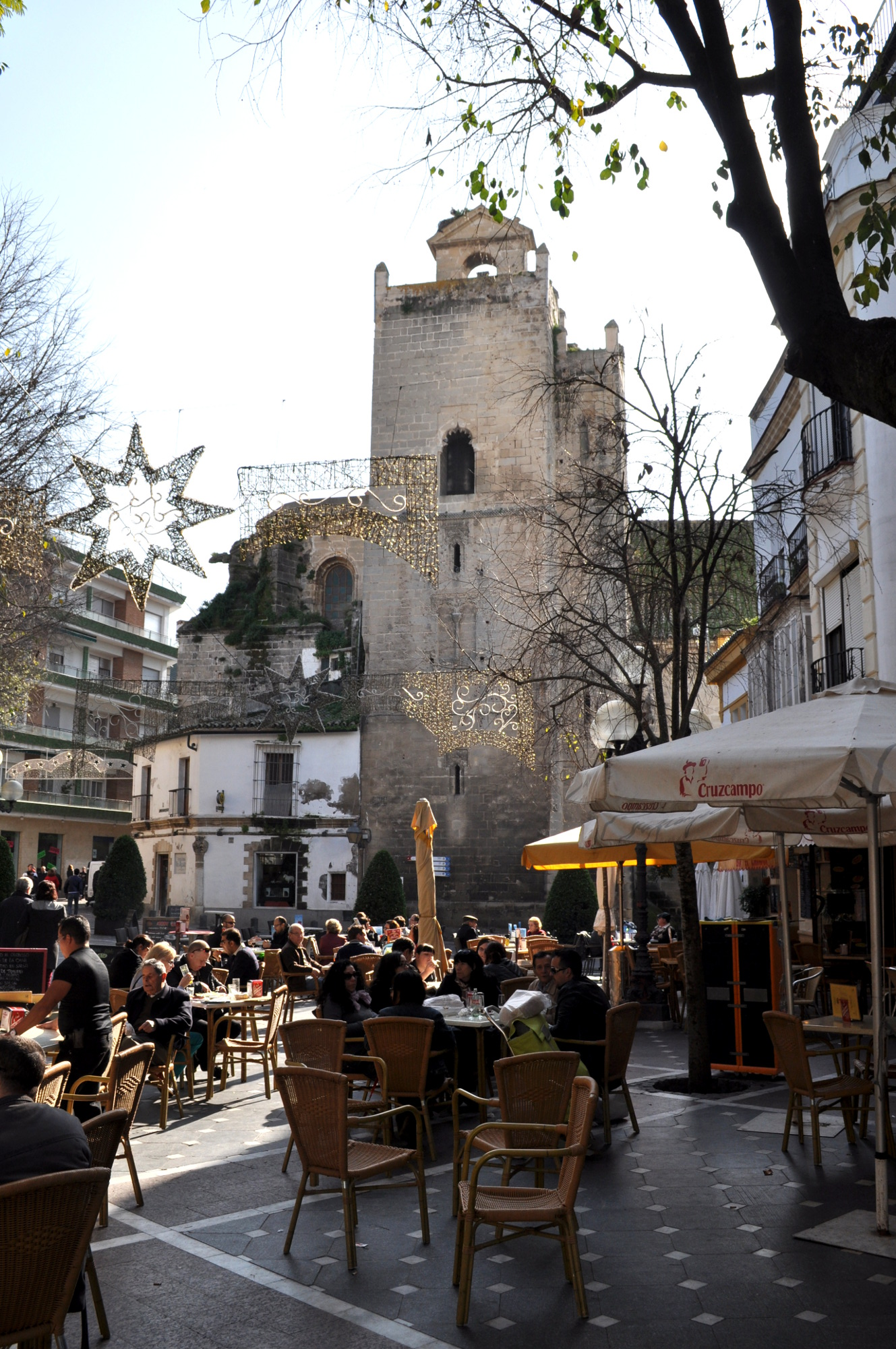 Torre de la Atalaya, Plaza Plateros, Jerez de la Frontera